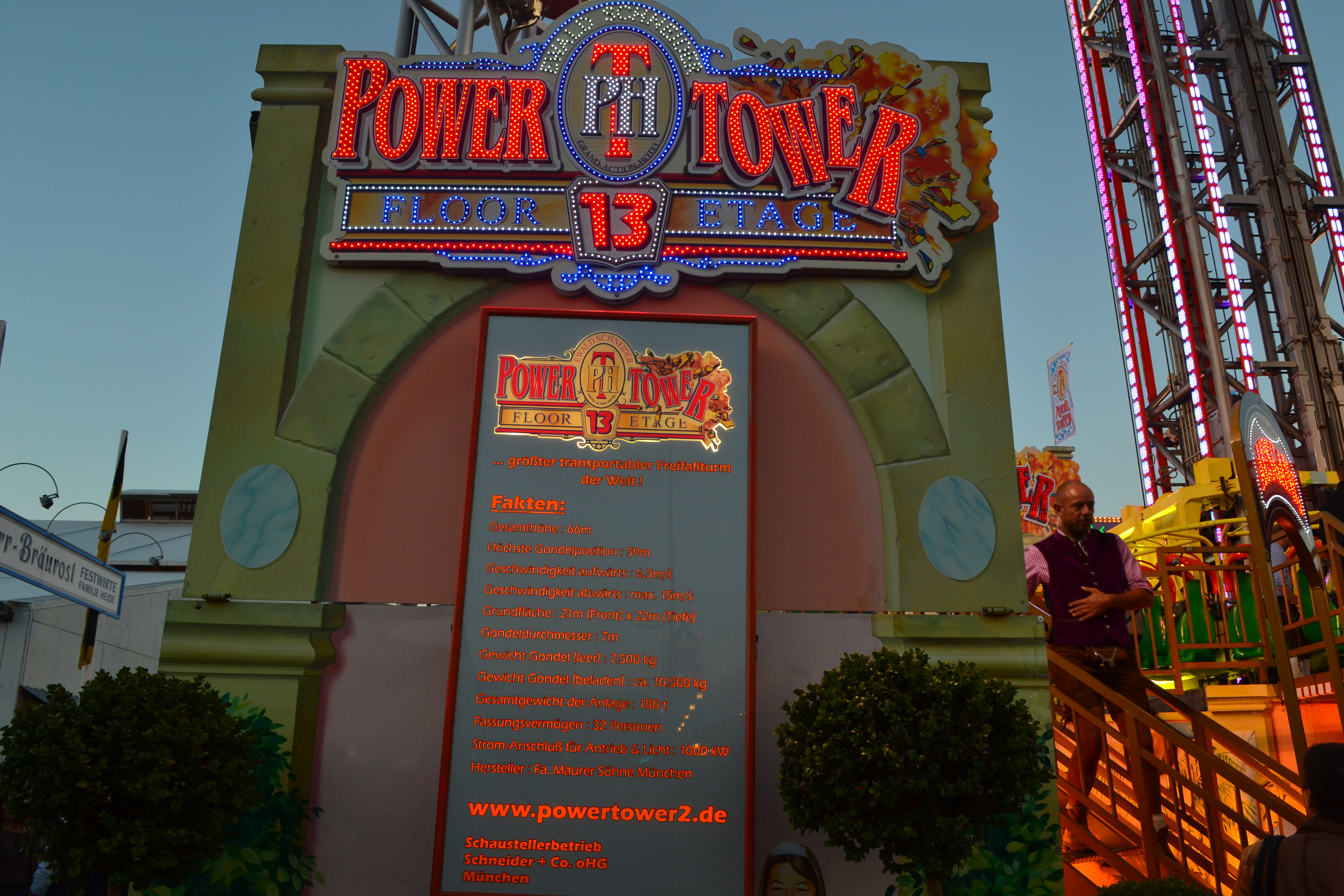 A Powertower szabadesés torony táblája Münchenben az Oktoberfesten